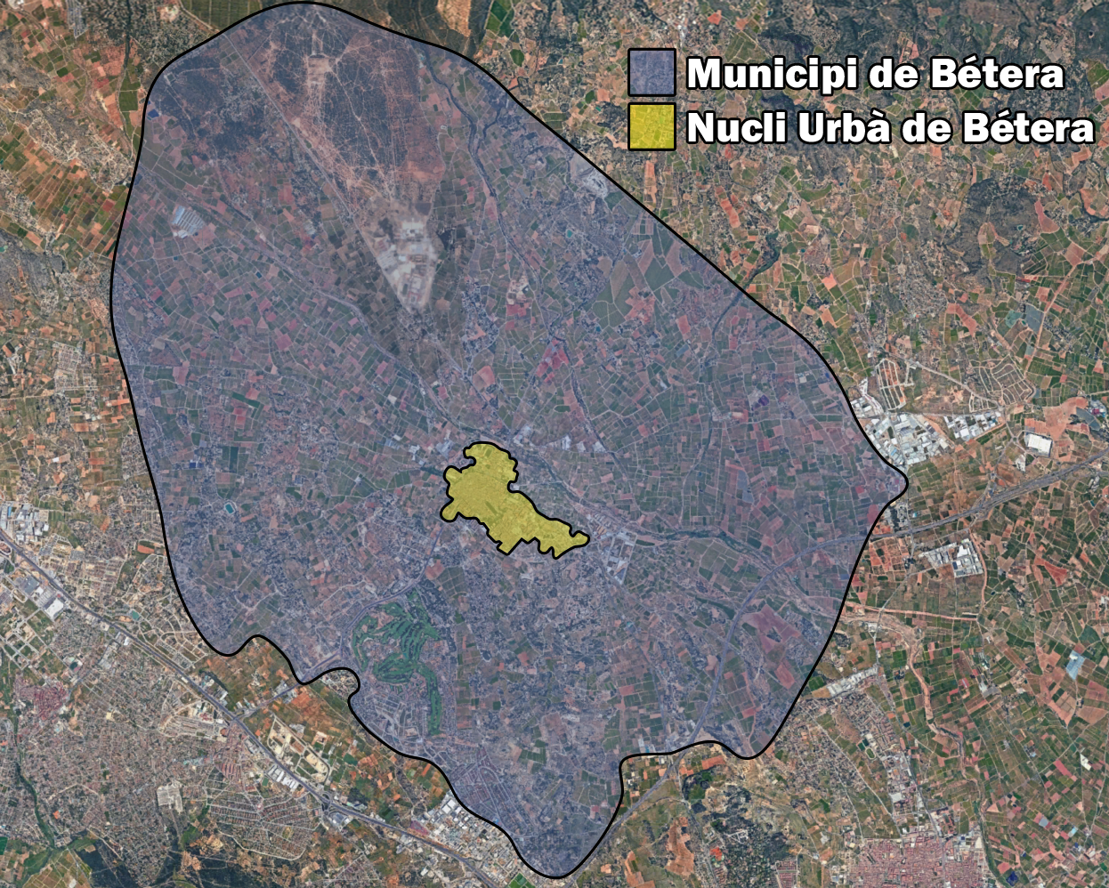 En la imatge es mostra la comparació entre el Municipi de Bétera (blau) i el Nucli Urbà de Bétera (groc).